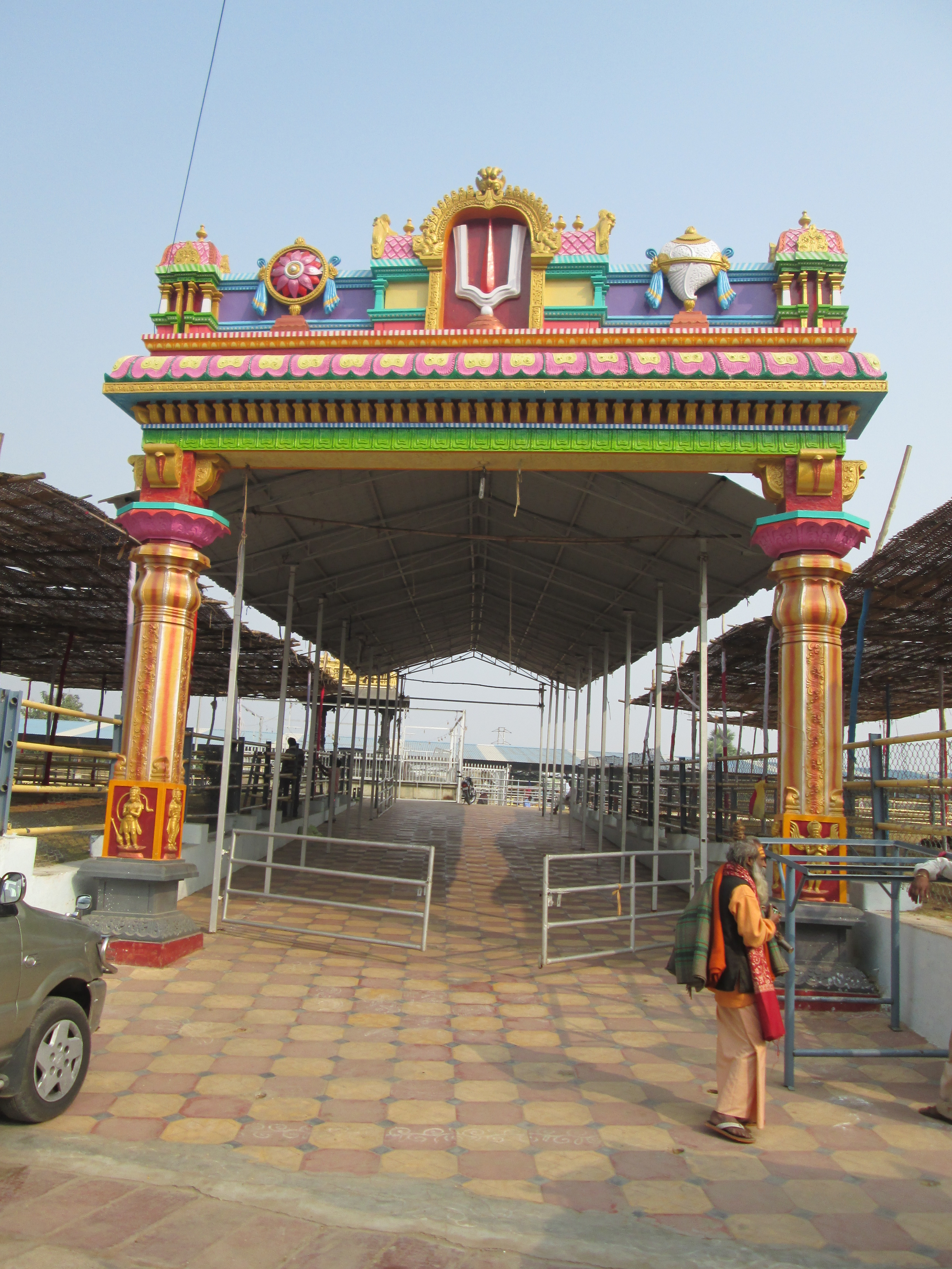 భద్రాచలం శ్రీ సీతారామచంద్ర స్వామి వారి దేవస్థానము